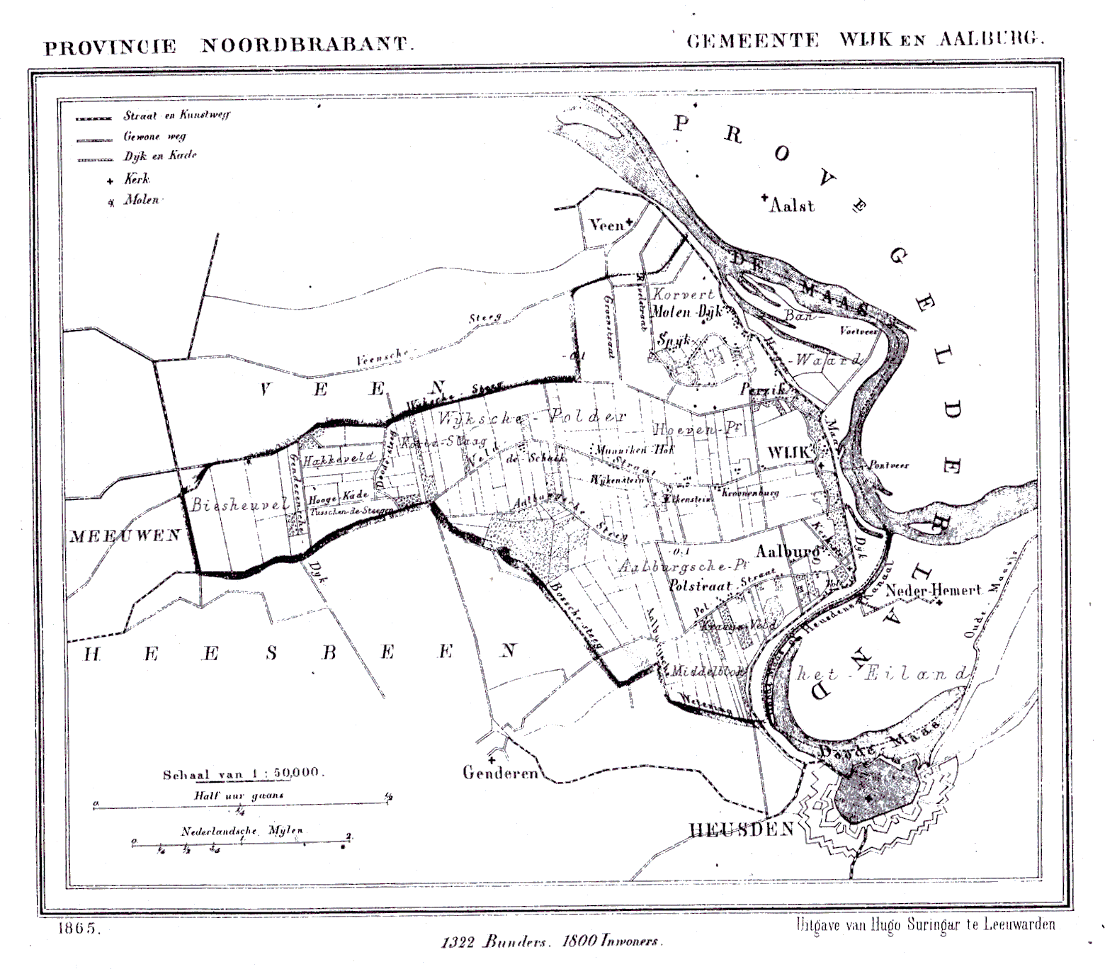 Nederland, Noord-Brabant, Gemeente Wijk en Aalburg